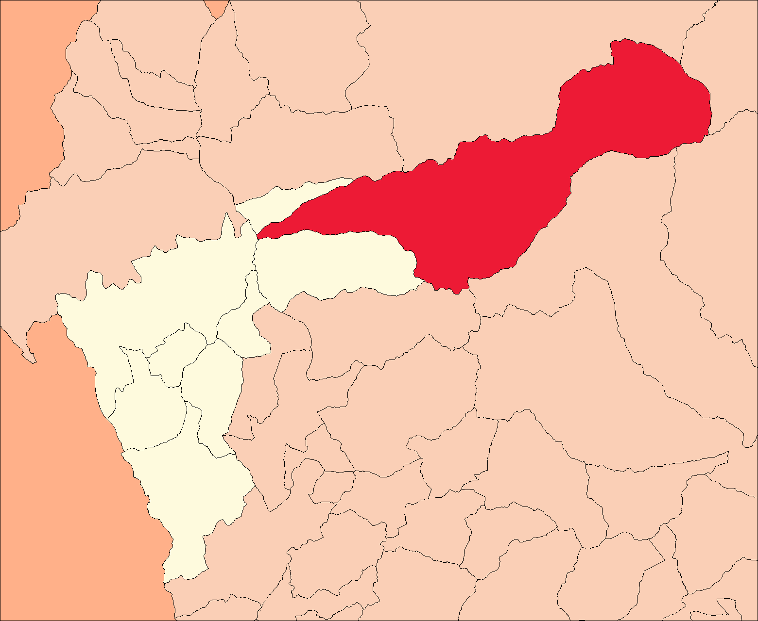 Ubicación del distrito de Marías.